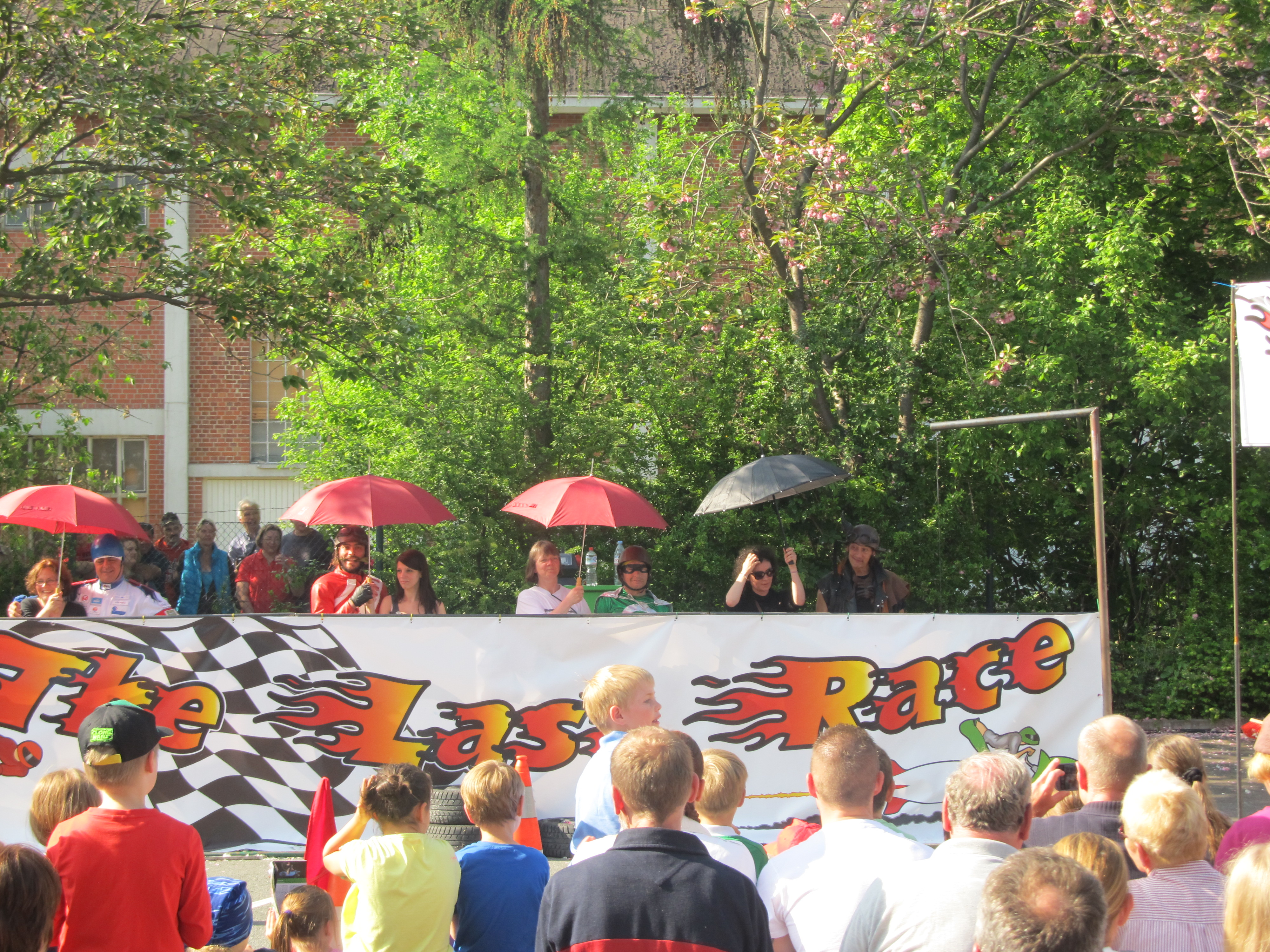 Die Theatergruppe Les Goulus aus Frankreich mit dem Stück "The Lats Race" als Uraufführung beim 12. Internationalen Straßentheterfestival in Holzminden 2013.